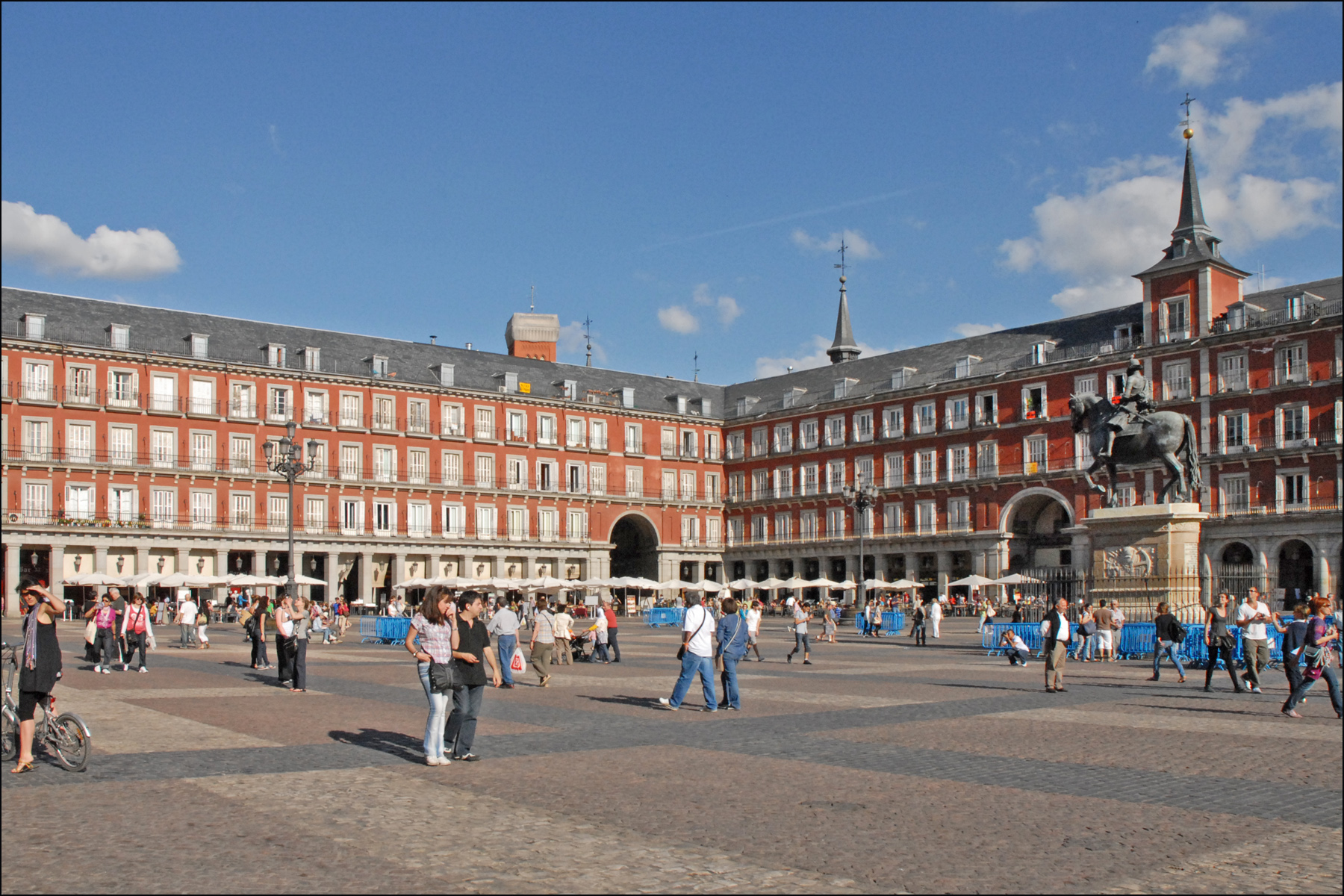 La Plaza Mayor de Madrid fut construite en 1618 par Juan Gómez de Mora, elle remplace un ancien marché. Une statue équestre de Philippe III (réalisée par Jean Bologne et achevée après sa mort par le Florentin Pietro Tacca) est installée au centre, et on y découvre également la Casa de la Panadería, facilement reconnaissable grâce aux fresques qui décorent sa façade. La Plaza Mayor fut un des centres les plus actifs de Madrid du XVIIe siècle.(extrait de Wikipedia)